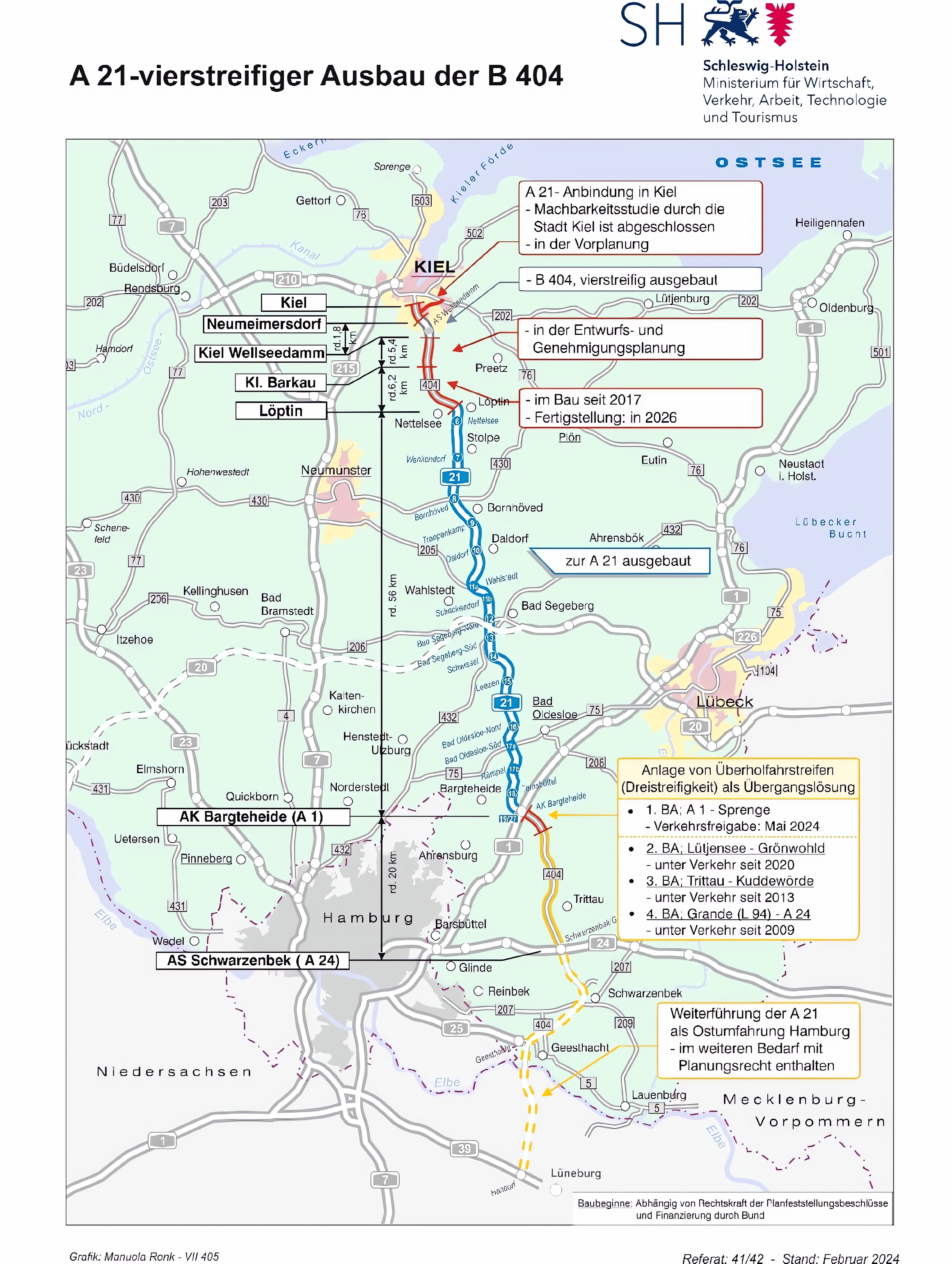 Ausbau der BAB 21 in Schleswig-Holstein - Stand Januar 2016